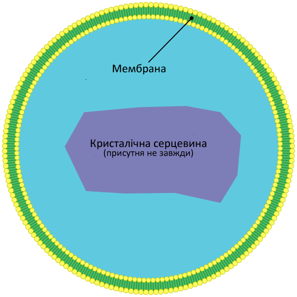 Схематичне зображення пероксисоми